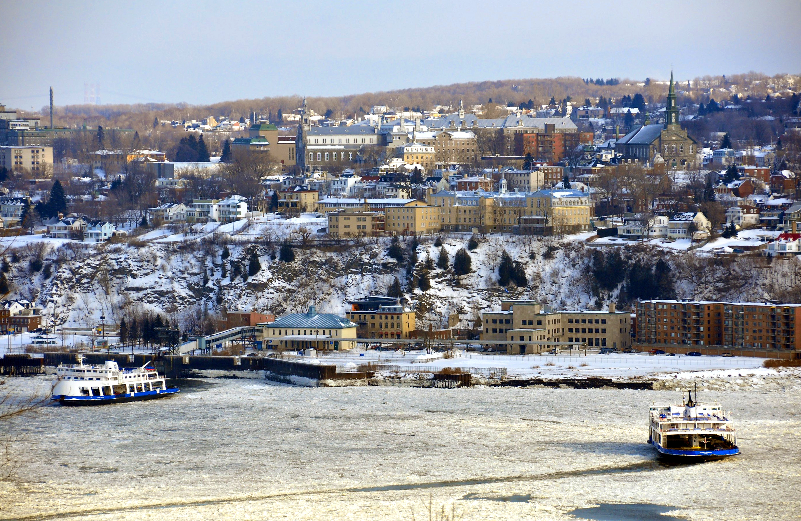 Lévis